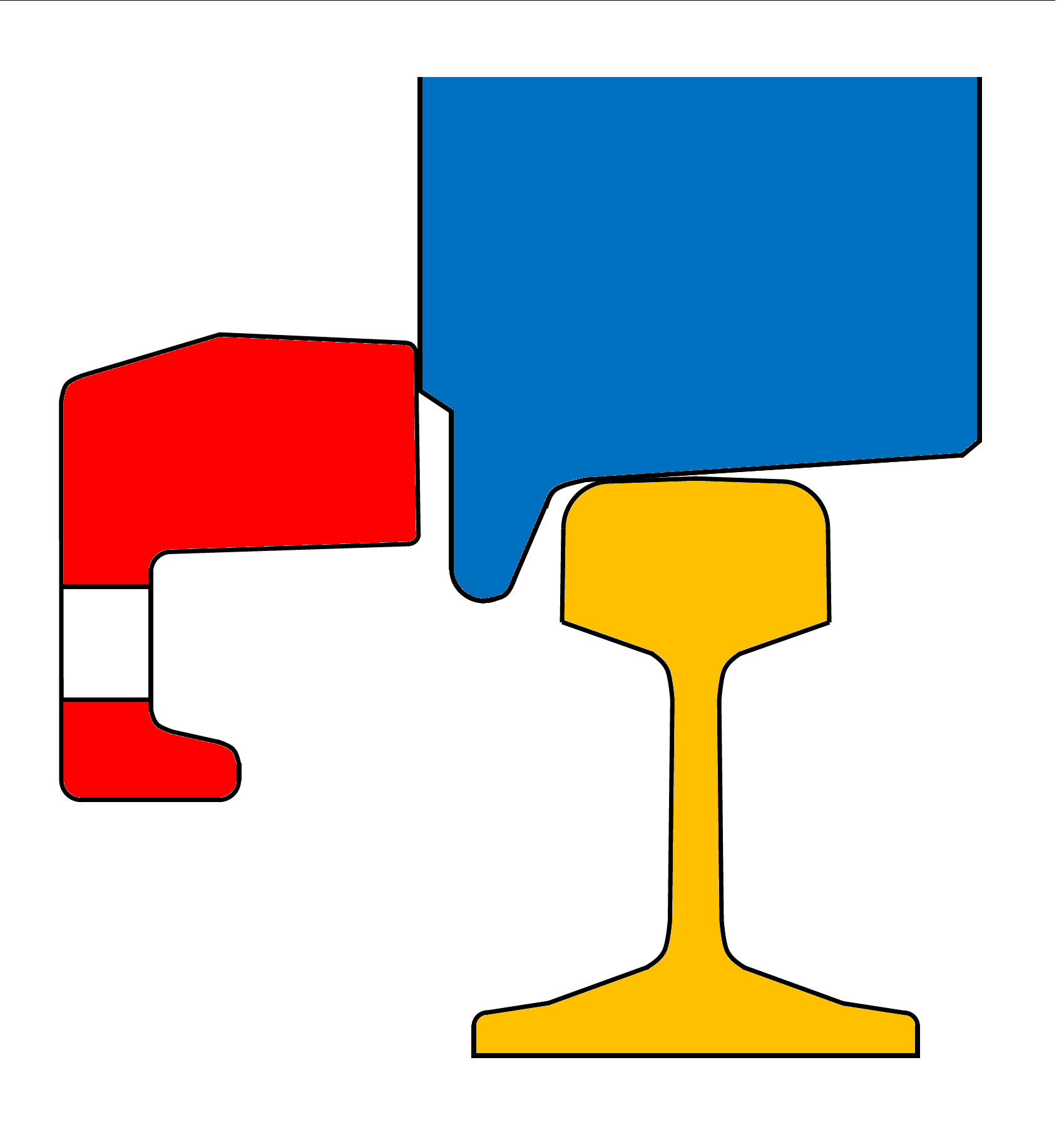 Die Radlenker­ (rot) der SGA-Strecke der Appenzeller Bahnen (AB) weisen eine Überhöhung von 30 mm gegenüber der Schienenoberkante auf.Die Tango-Züge der AB sind wegen den unterschiedlichen Radlenker­überhöhungen – bei der SGA-Strecke betragen sie 30, bei der TB 0 Millimeter – mit Radreifenprofilen (blau) wie beim Karlsruher Modell ausgestattet.